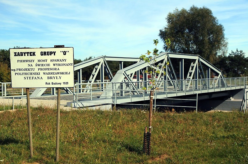 Maurzyce. Zabytek Grupy O. Pierwszy most spawany na świecie, wykonany wg projektu profesora Politechniki Warszawskiej Stefana Bryły. Rok budowy 1929.